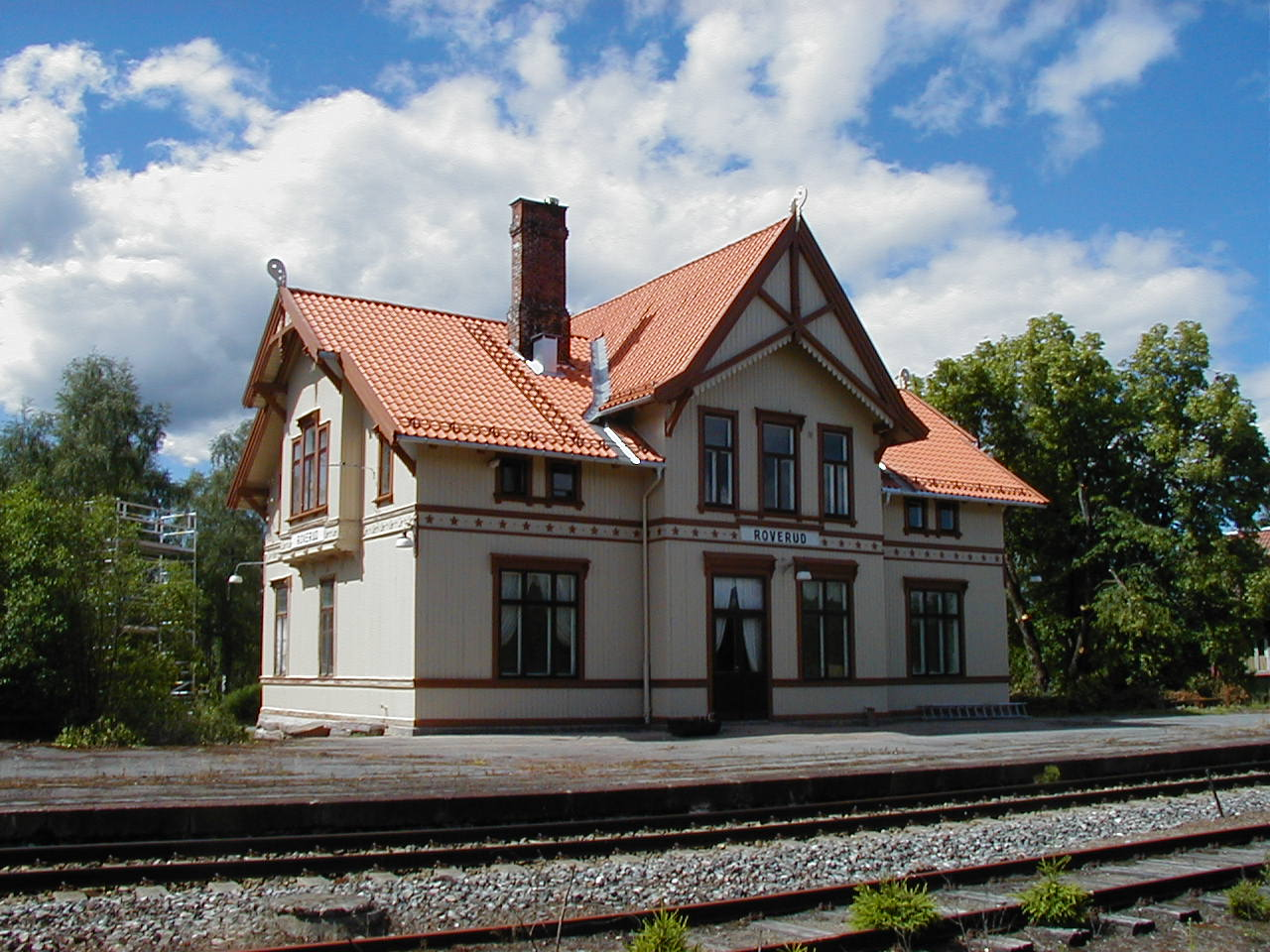 Roverud stasjon